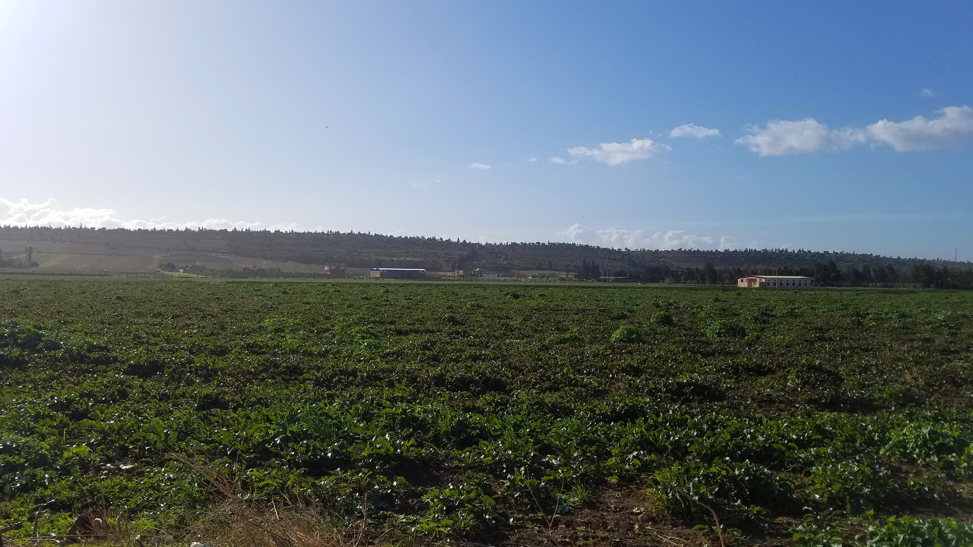 Terre agricole à Hay El Ramlia (Au nord de la ville de Chlef)